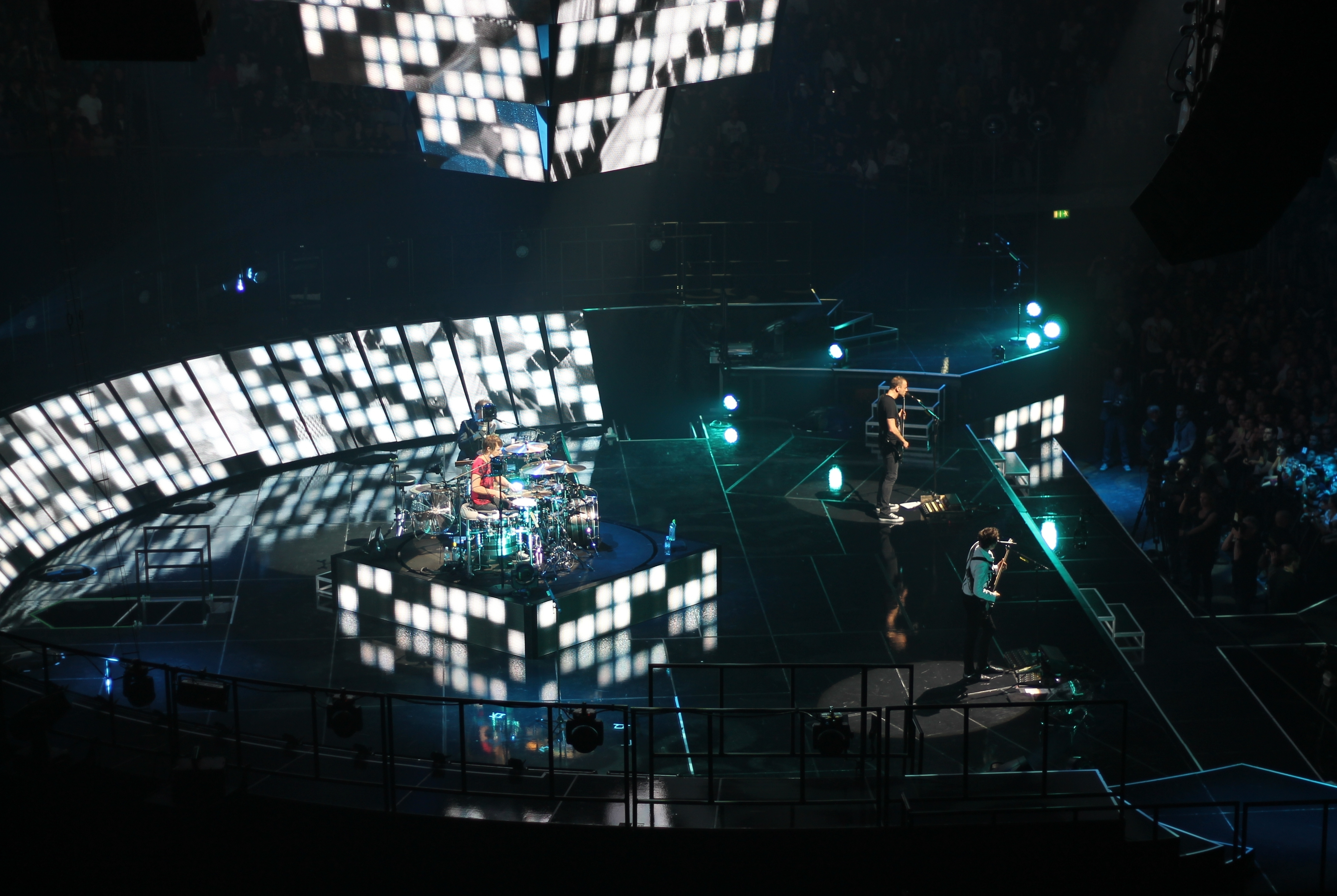 Avec Muse, on se laisse emporter dans un univers musical où rien n’est acquis et où tout peut basculer à n'importe quel moment, même au cœur d’une piste.